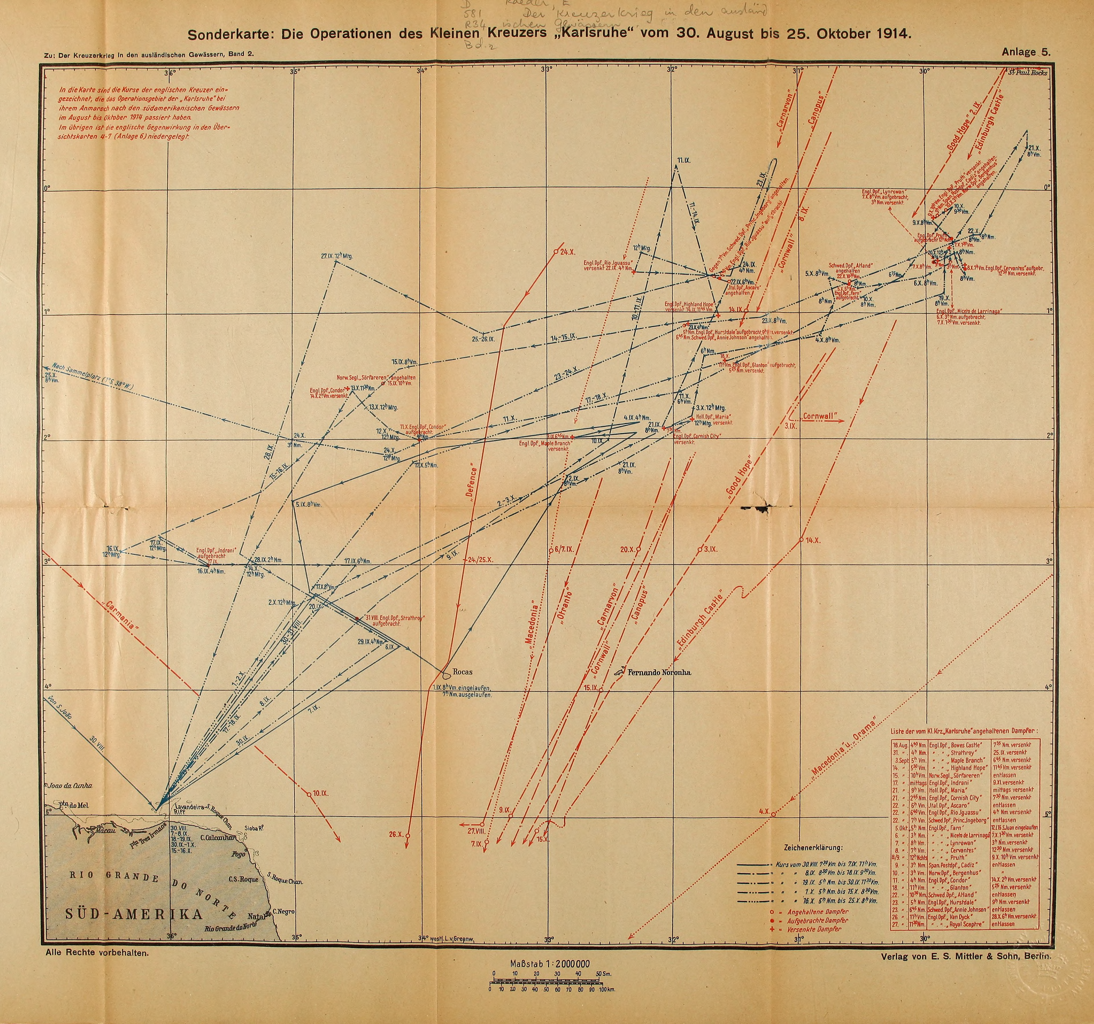 Die Operationen des Kleinen Kreuzers Karlsruhe vom 30. August bis 25. Oktober 1914